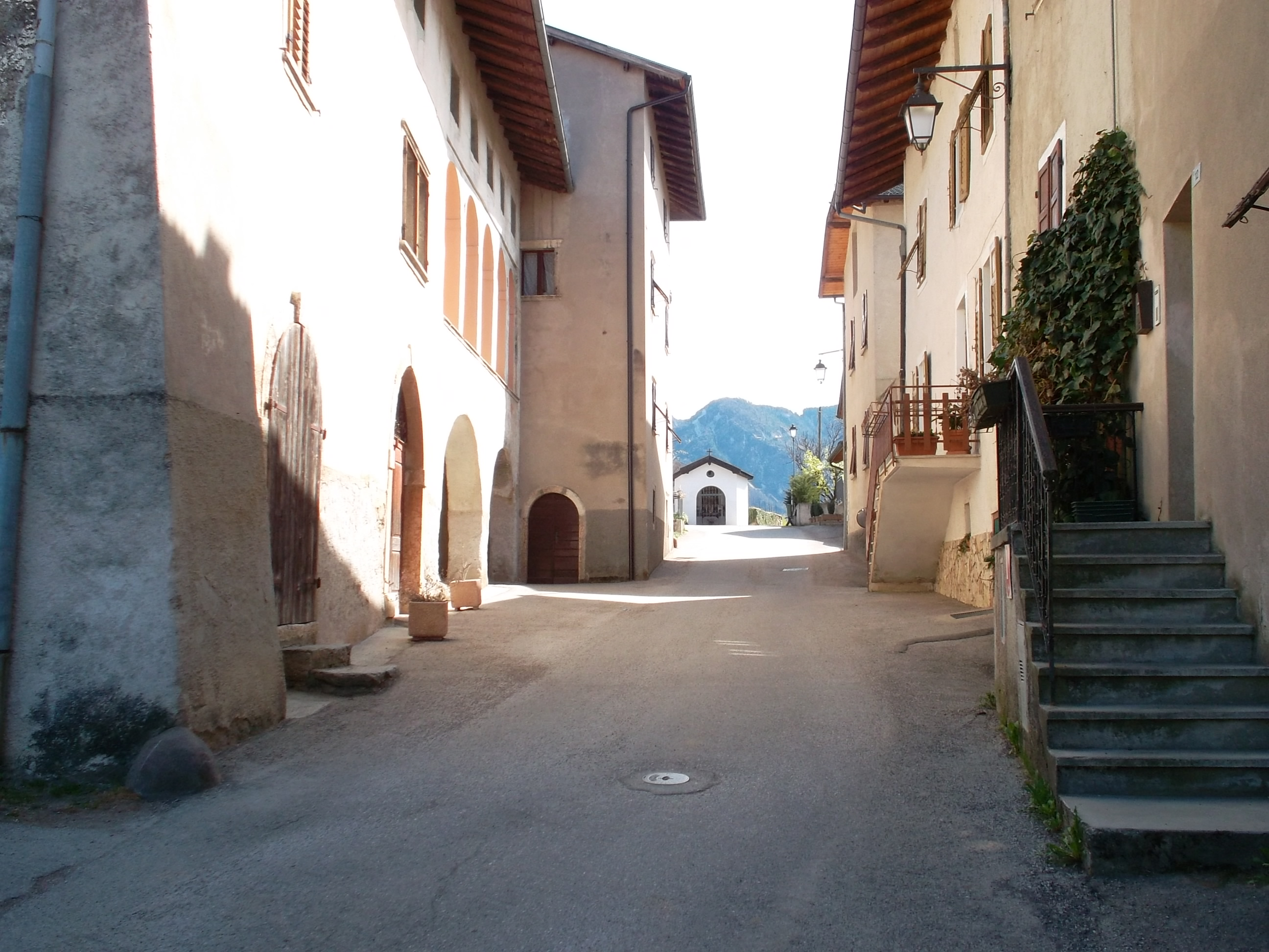 Via di Tenna